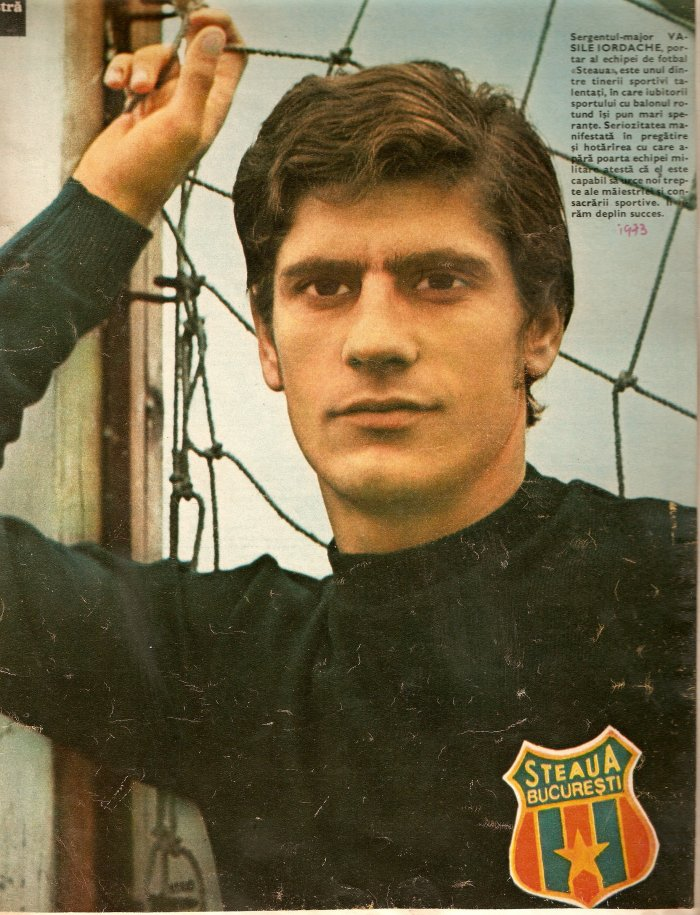 Vasile Iordache in 1973